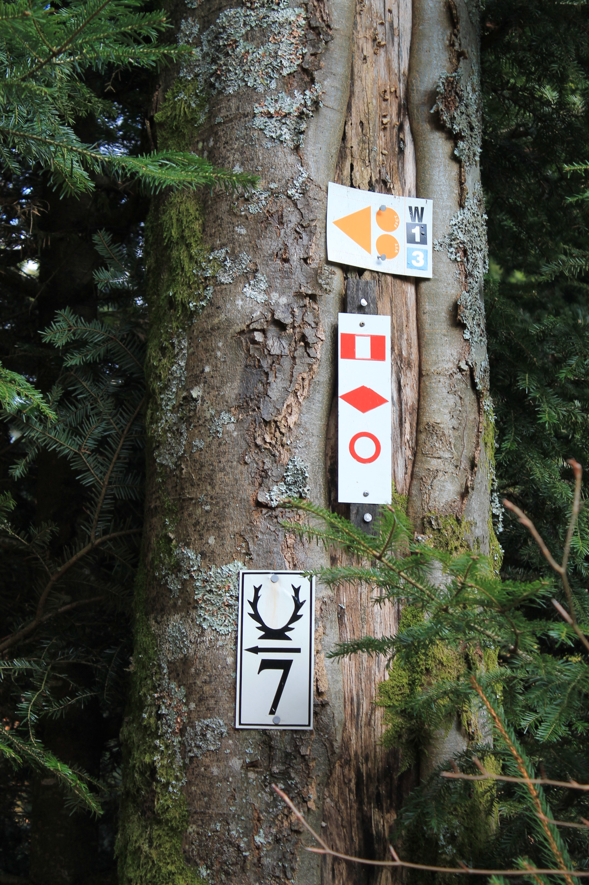 Balsiage VTT-randonnée